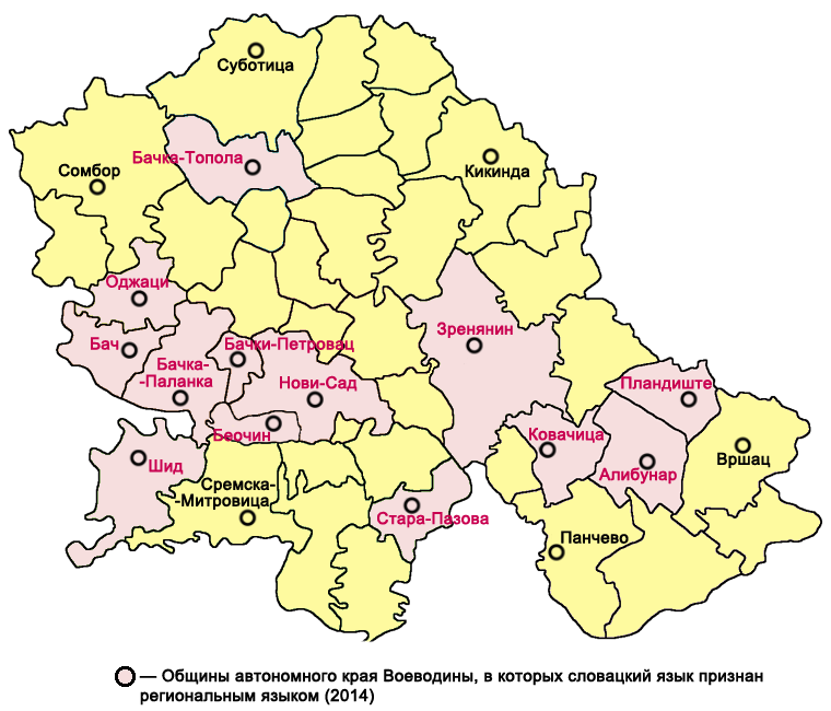 Общины автономного края Воеводина, в населённых пунктах которых (с численностью говорящих на словацком от 15 % всего населения и выше) словацкий язык выполняет функции официального языка согласно сербскому законодательству о языках национальных меньшинств (по состоянию на 2014 год)